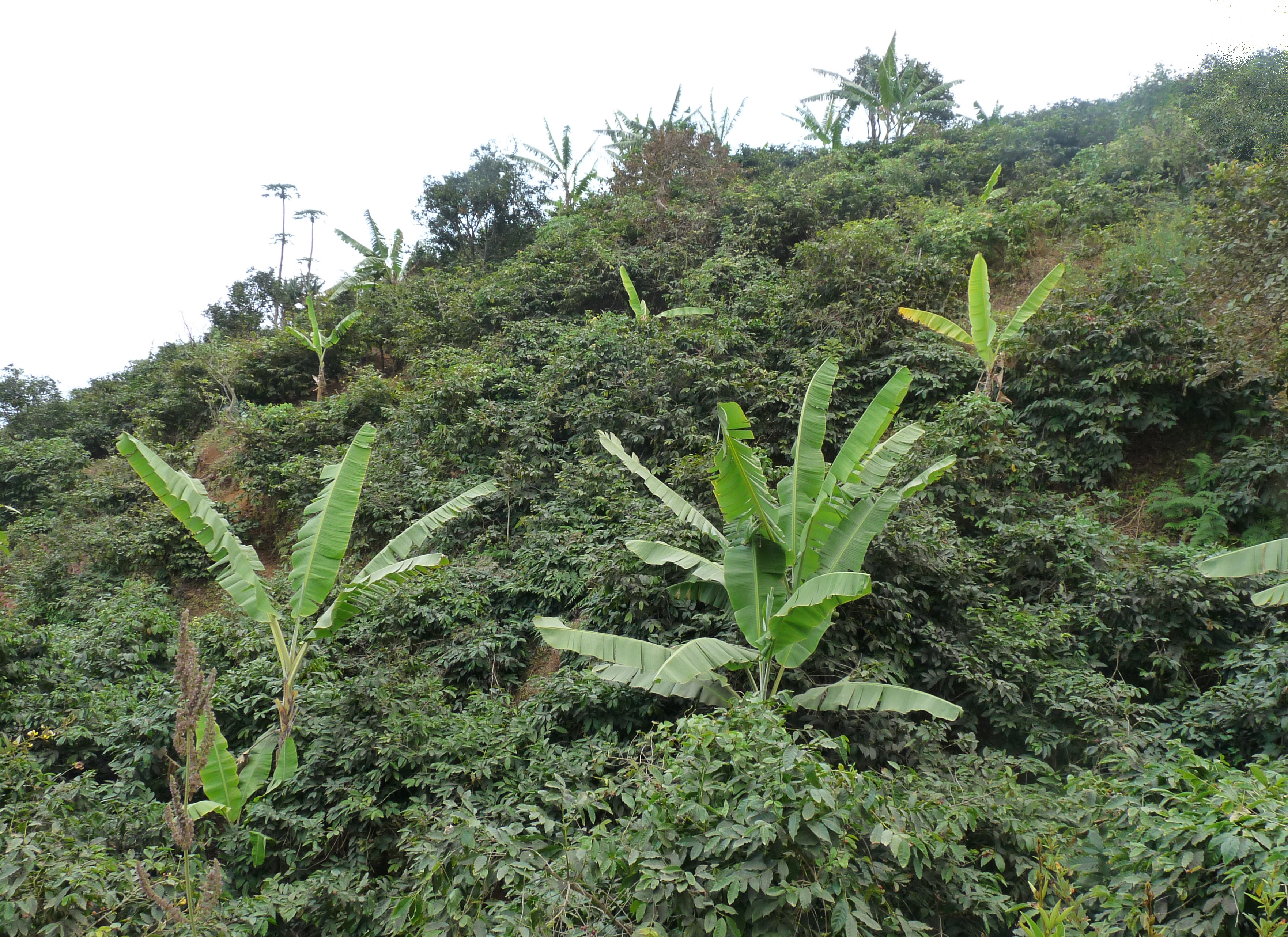 Fogo (Cap-Vert) : Bananiers au milieu des caféiers, sur les hauteurs de Mosteiros